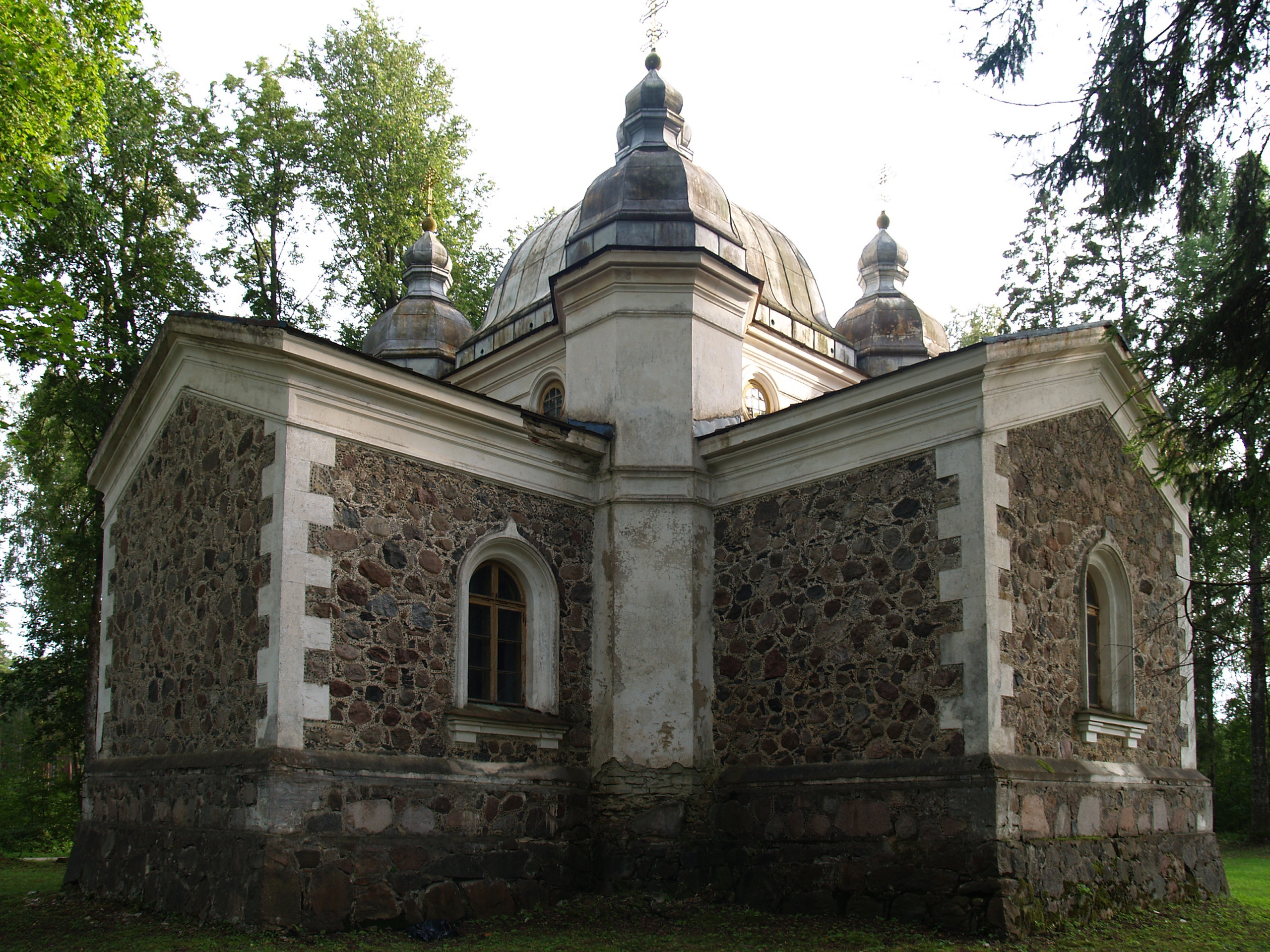 Uruste õigeusu kirik